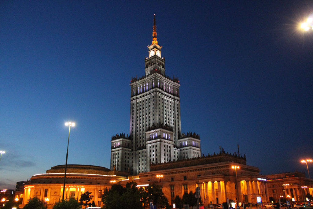 Palacio de Cultura y Ciencia Varsovia.